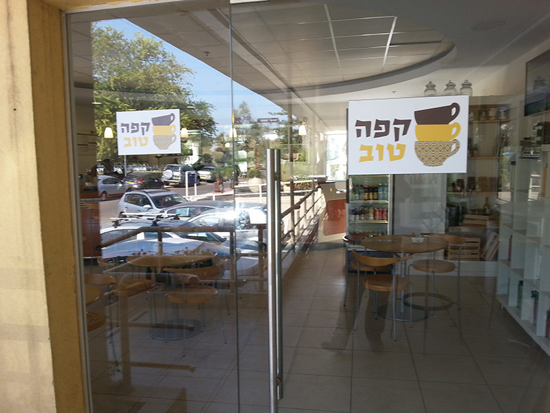 תחום חנויות בקבוצת שכולו טוב